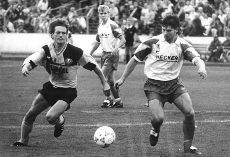 15.9.90 Dresden: Fußball-Oberliga - FC Dynamo Dresden - Chemnitzer FC 1:1 (1:1)- Synchron auf der ganzen Linie spielen Gütschow (Torschütze für Dresden) und Bitermann (CFC). Der Ball in der Mitte, Punkteteilung - und beide Spieler heißen Torsten. ADN-Matthias Hiekel Information added by Wikimedia users.Korrekter Name: Torsten Bittermann